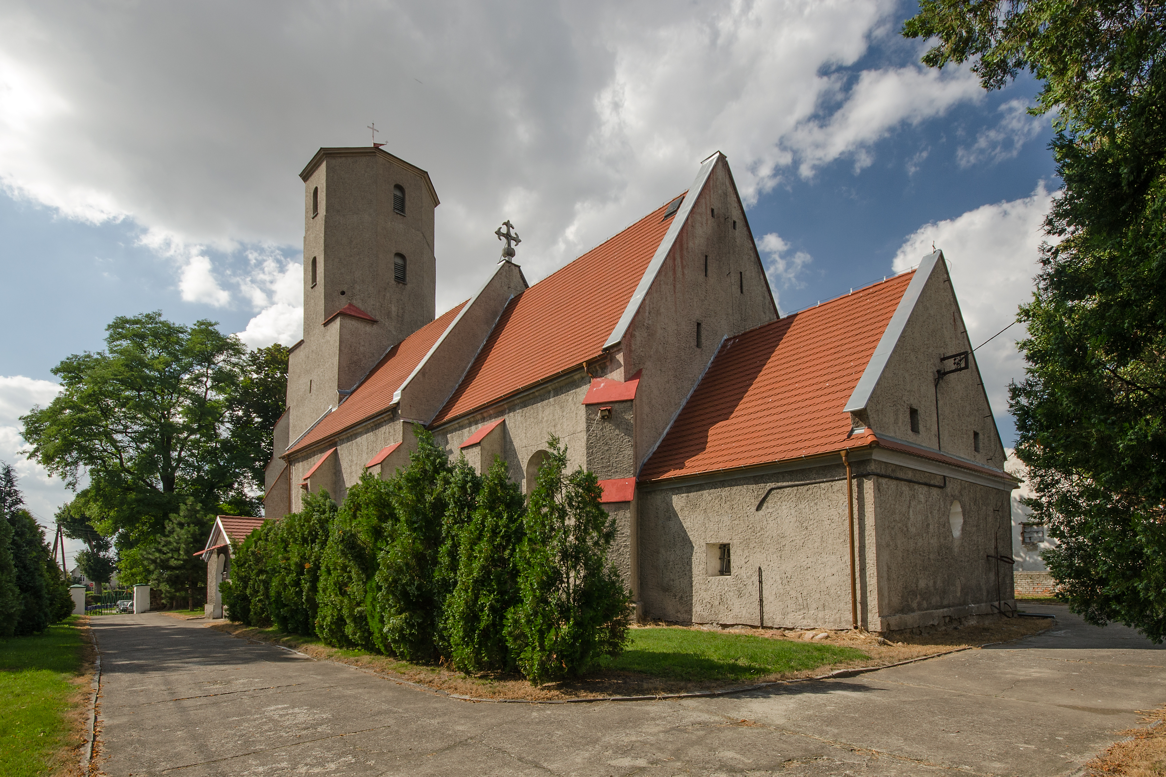 Kolnica - rzymskokatolicki kościół parafialny p.w. św. Wawrzyńca, XIV, XVIII, XIX